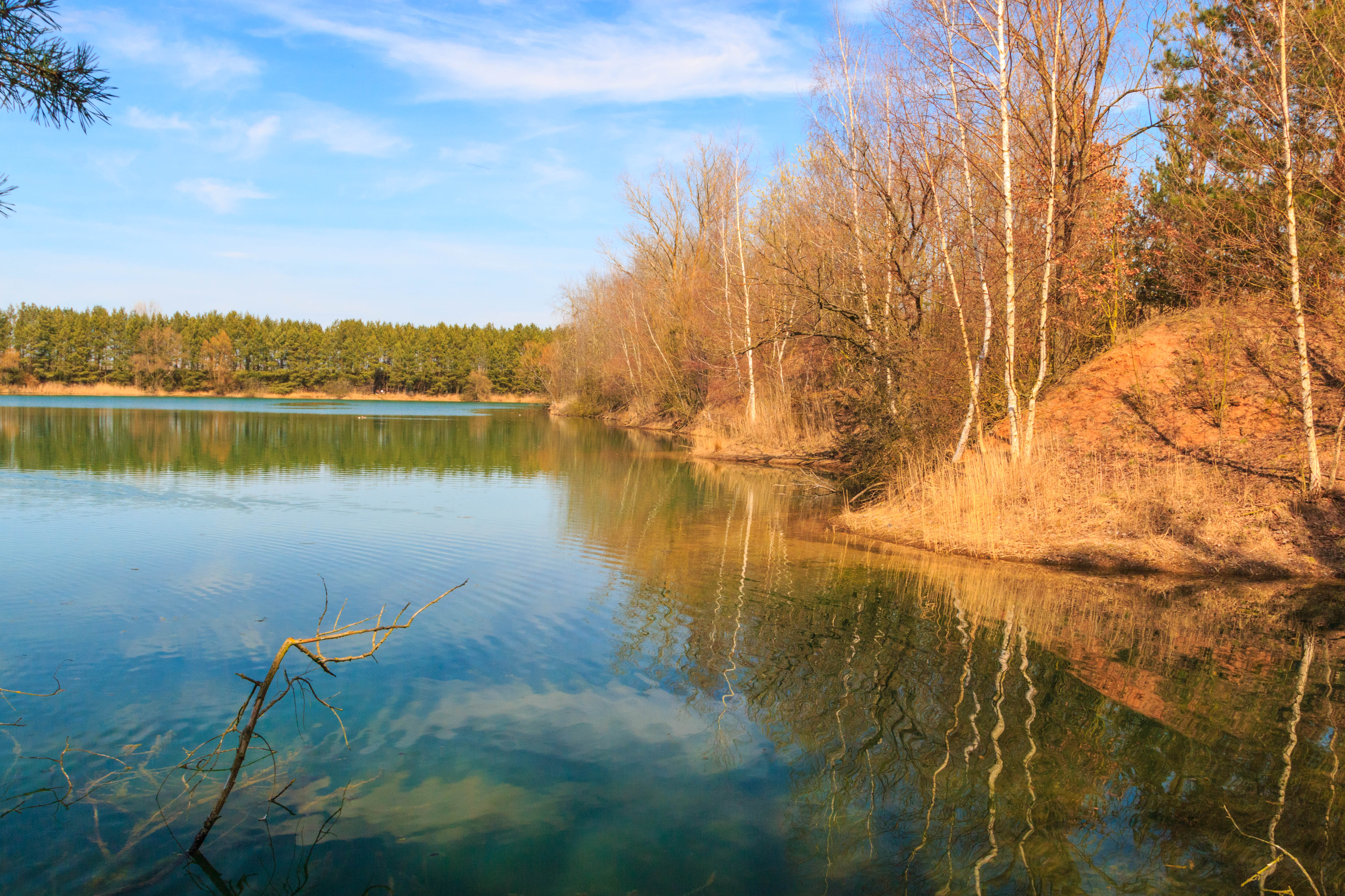 Písníky u obce Písek v okrese Hradec Králové Project: Vodstvo.